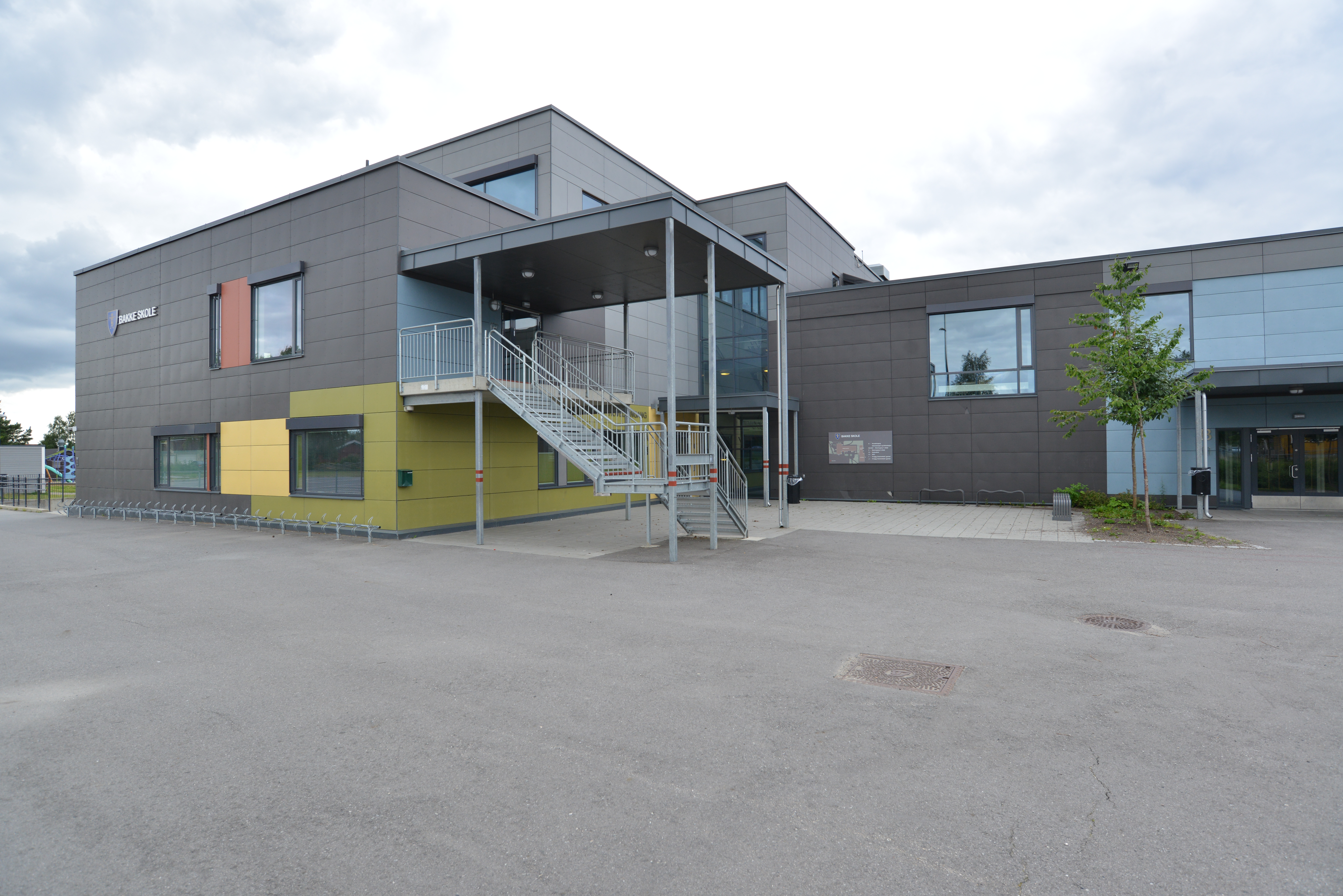 Bakke skole på Kløfta i Ullensaker